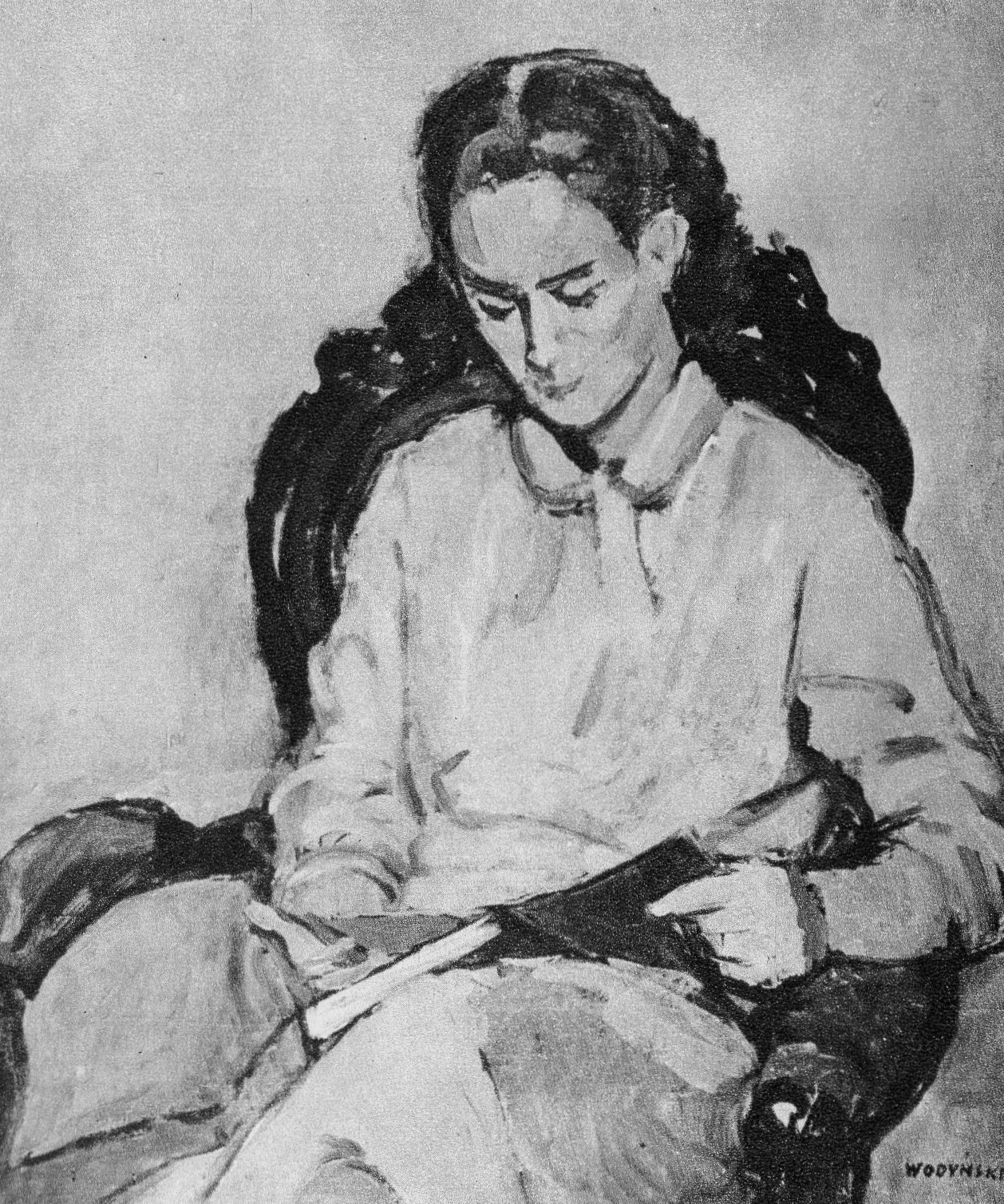 Jan Wodyński, Czytająca, 1954.